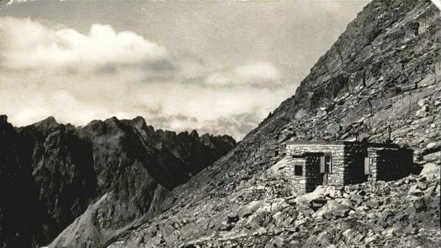 Chata pod Rysmi - Vysoké Tatry - pôvodná